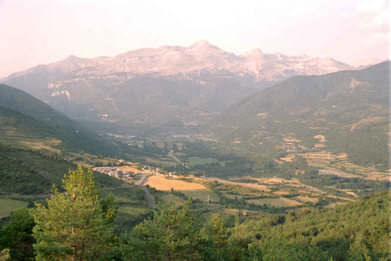 Valle del río Aragón, Pico Collarada en Villanúa, provincia de Huesca (España). Tomada por JMSE el 11 de julio de 2003 y cedida a Wikipedia. Categoría:España (imagen) Categoría:Fotografía (imagen)